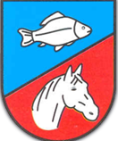 znak obce Těchařovice